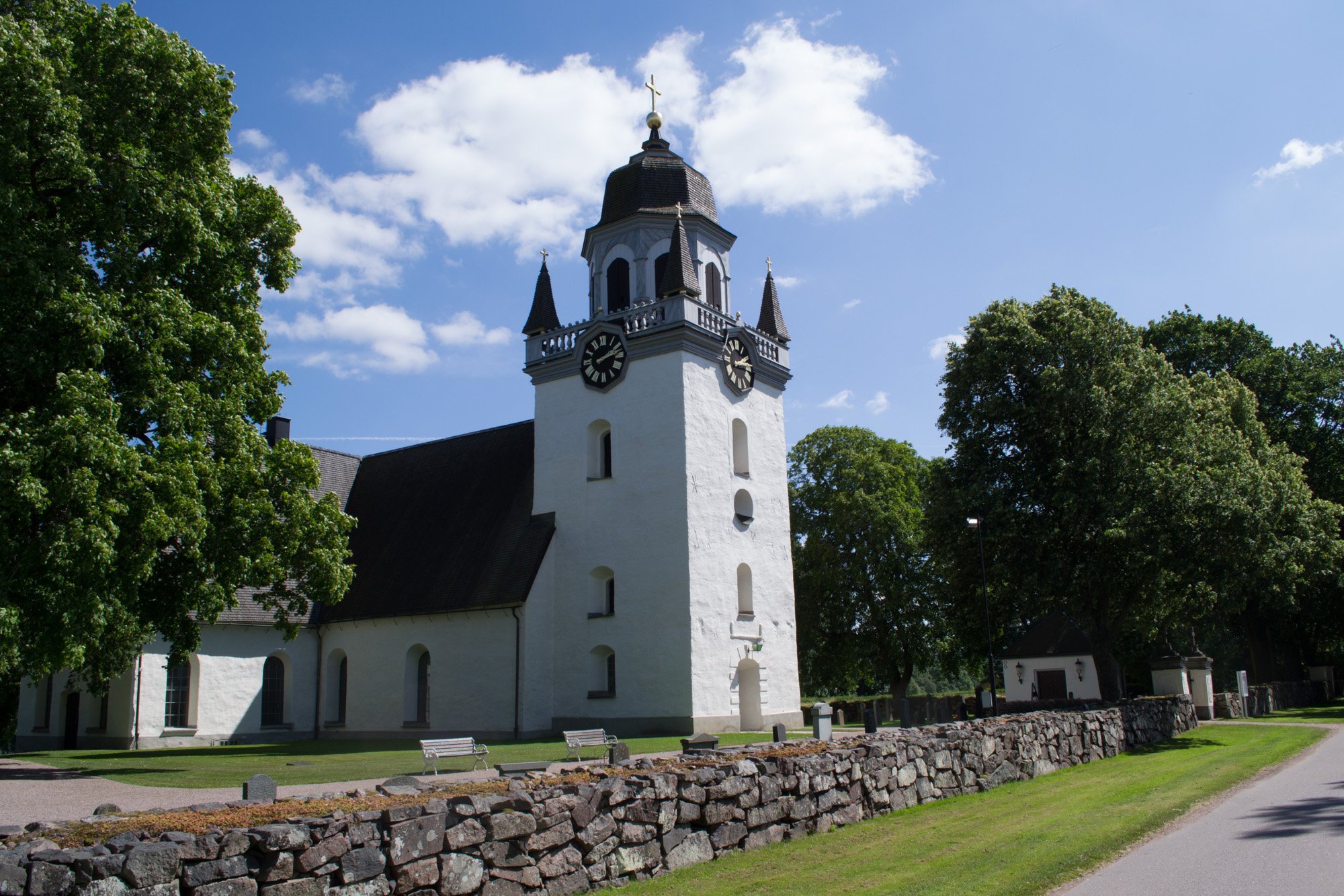 Säby Kyrka